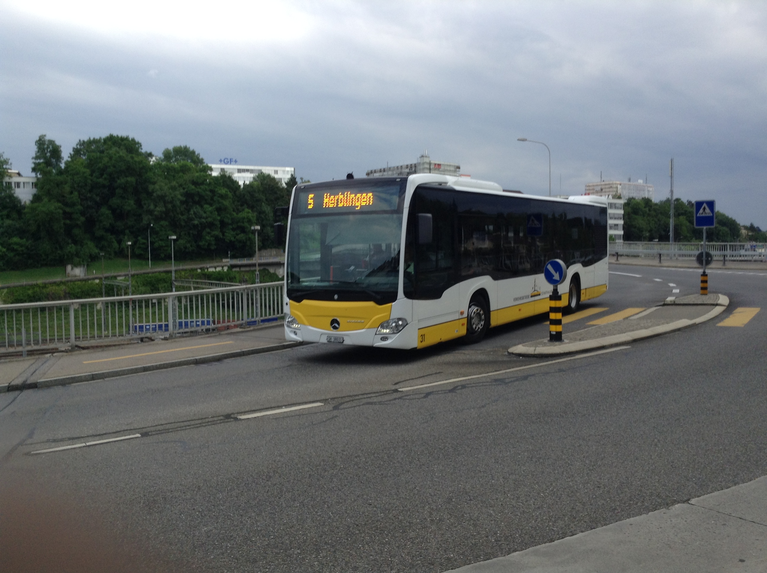 Ein Mercedes Citaro C2 auf der Linie 5